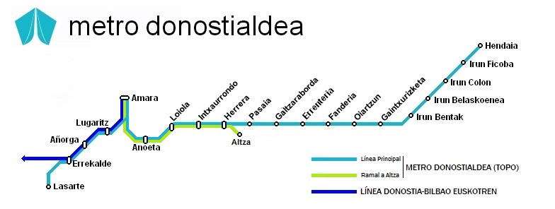 Plano línea Metro Donostialdea